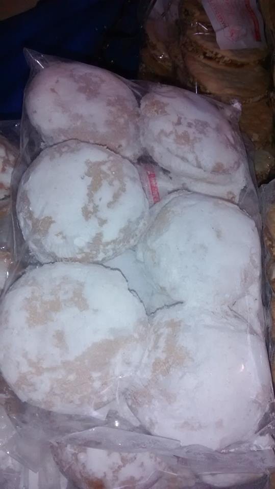 Dulces horneados base de harina y relleno de dulce de leche o manjar